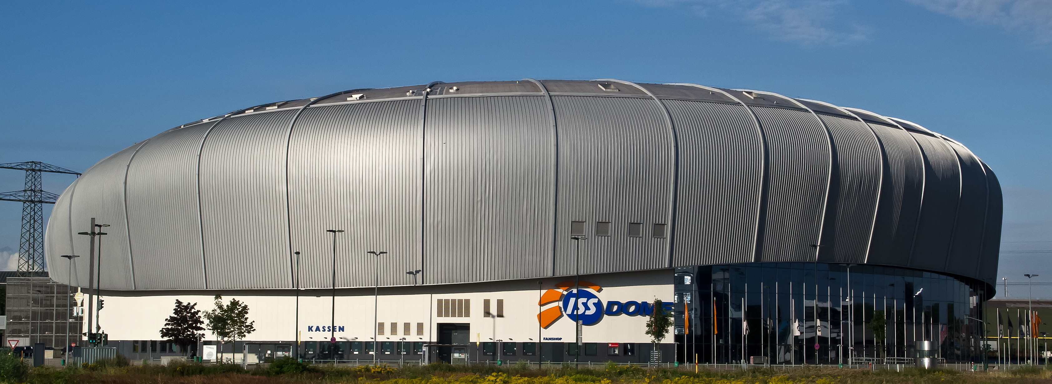 ISS DOME